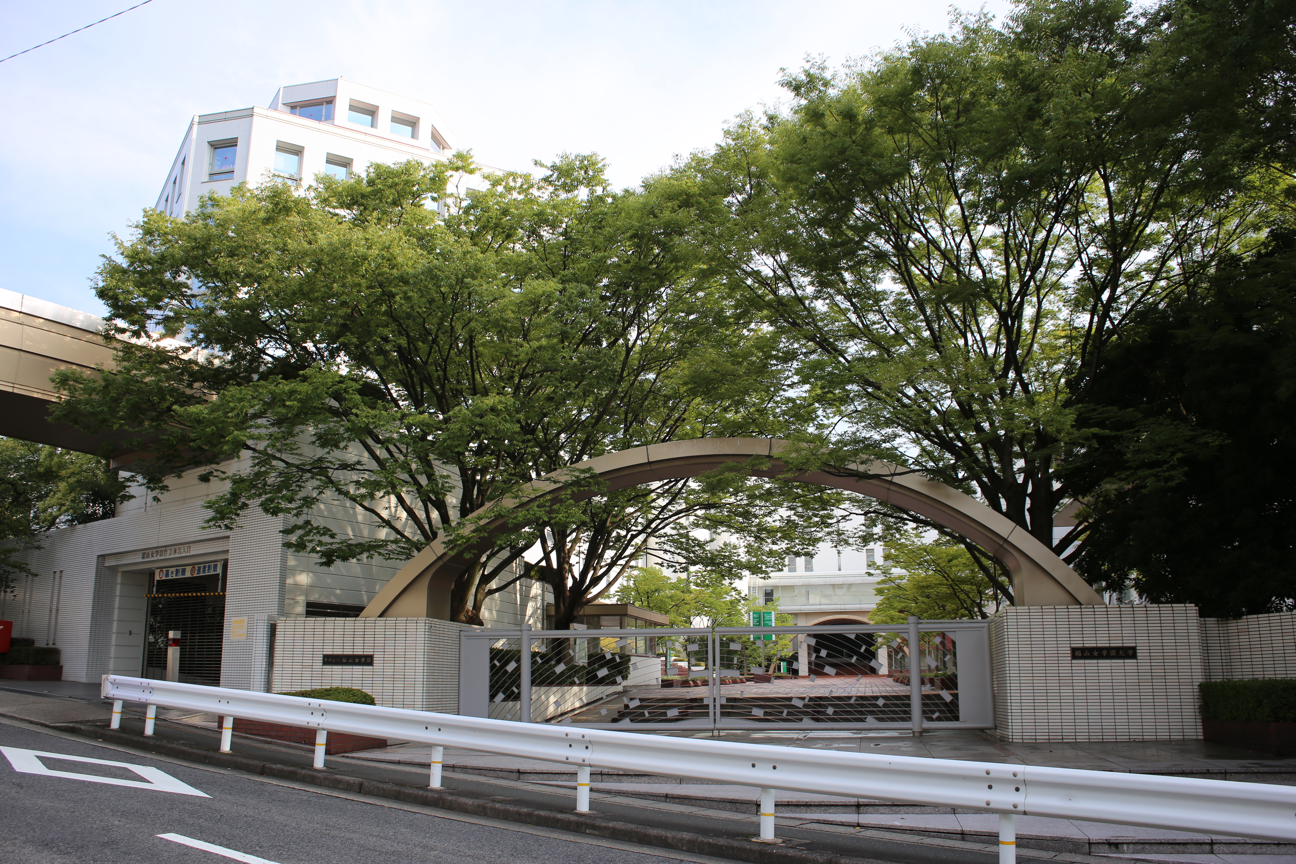 椙山女学園大学星が丘キャンパス